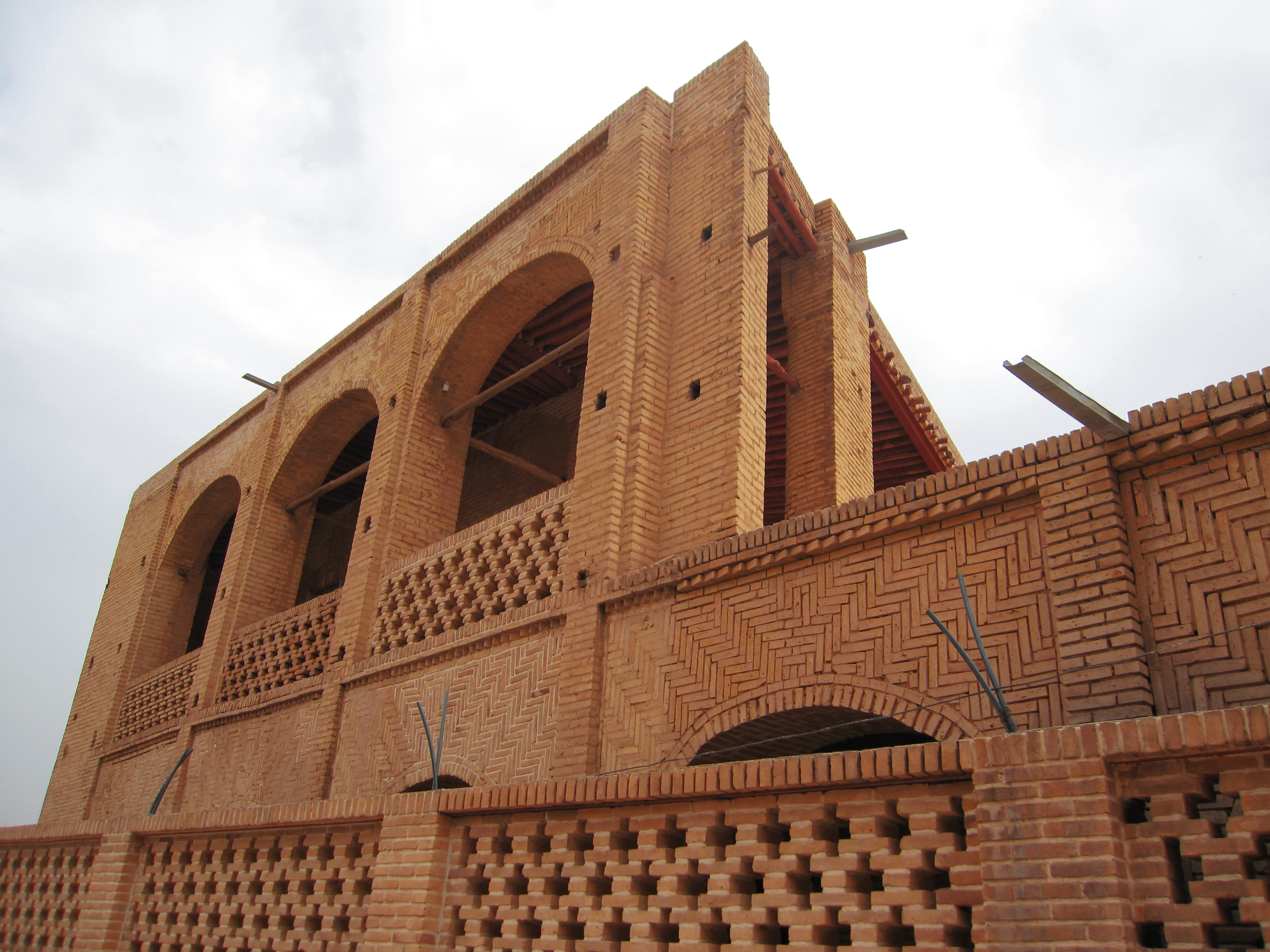 Iran - Ahvaz - Moeenotojar Building